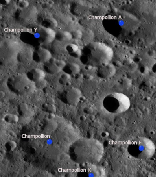 Cráter Champollion (LRO)